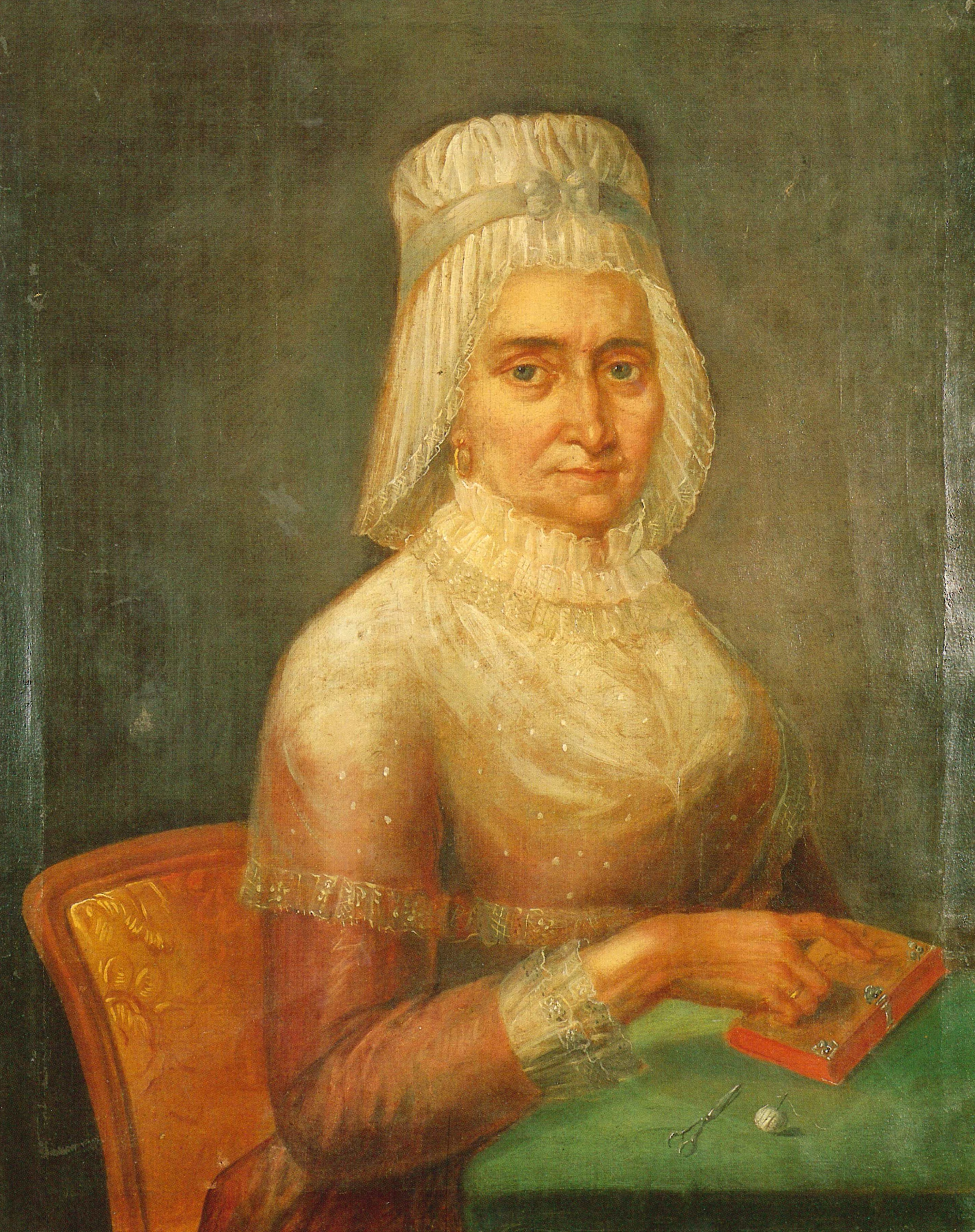 Portrait de Mme Chrétien Faber-Génin. Huile sur toile, non daté, non signé, collection privée.